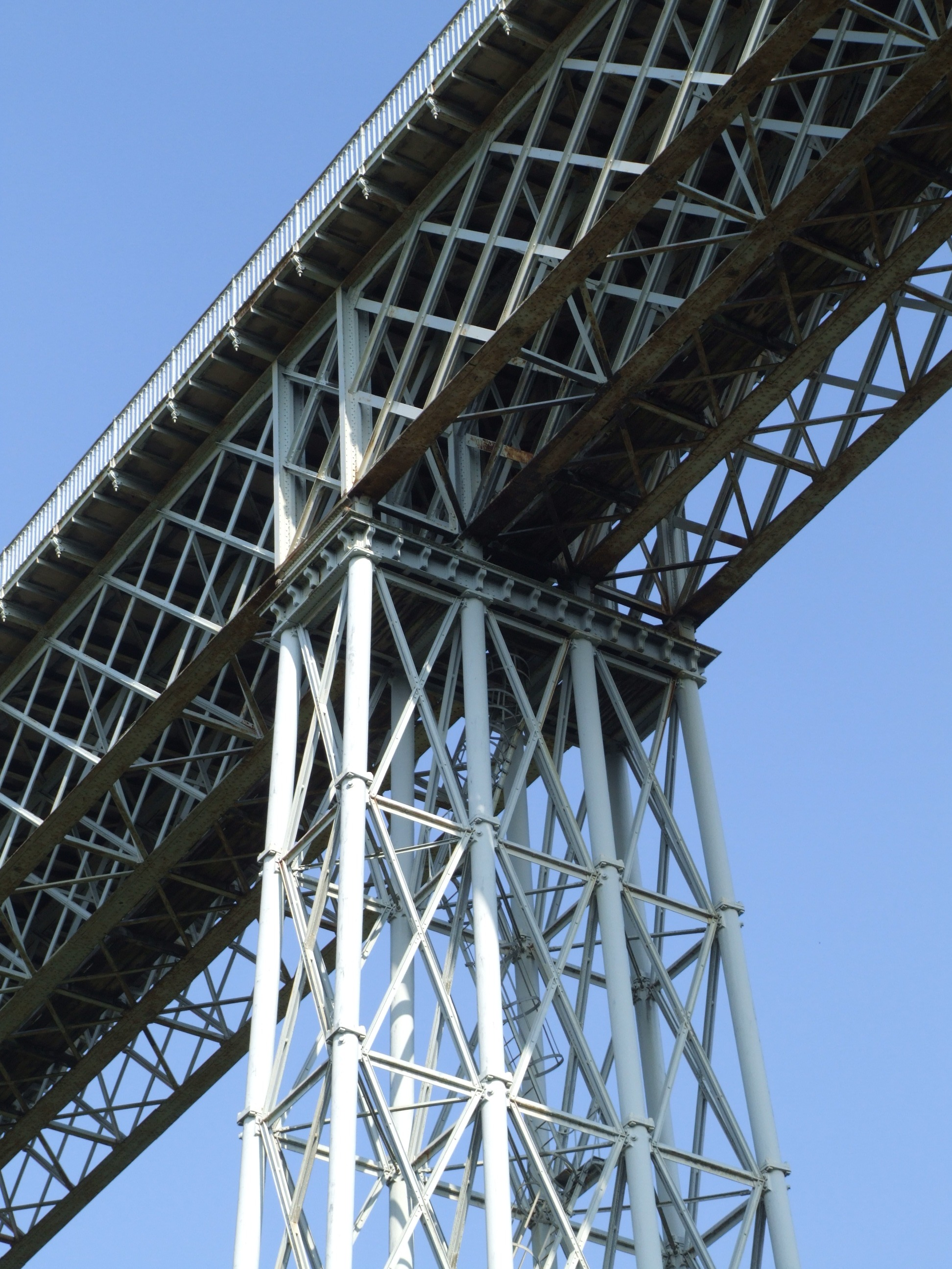 Viaduc de Busseau-sur-Creuse - Pile : partie supérieure